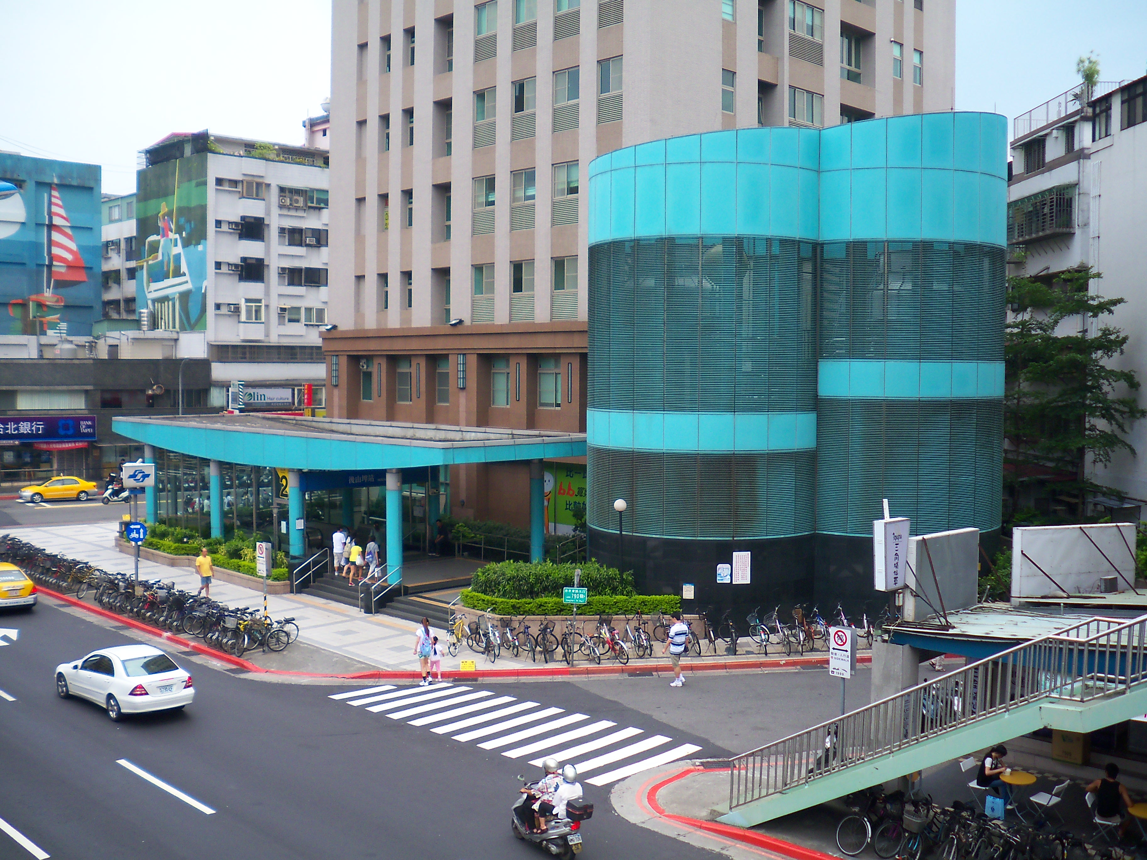 台北捷運南港線後山埤駅2号出口と冷房換気塔。